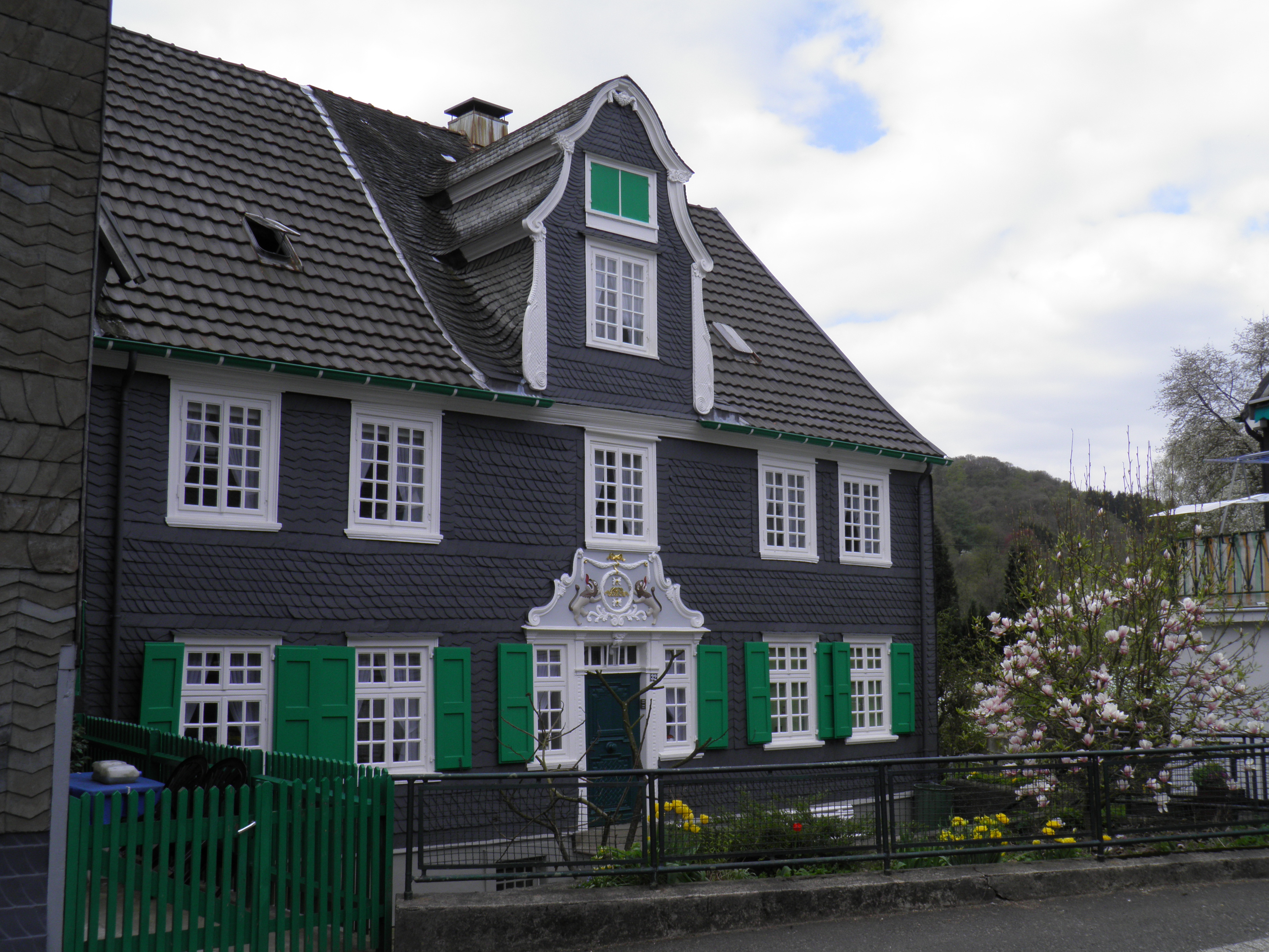 Haus Marksteller - ein bergisches Stilhaus in Morsbach